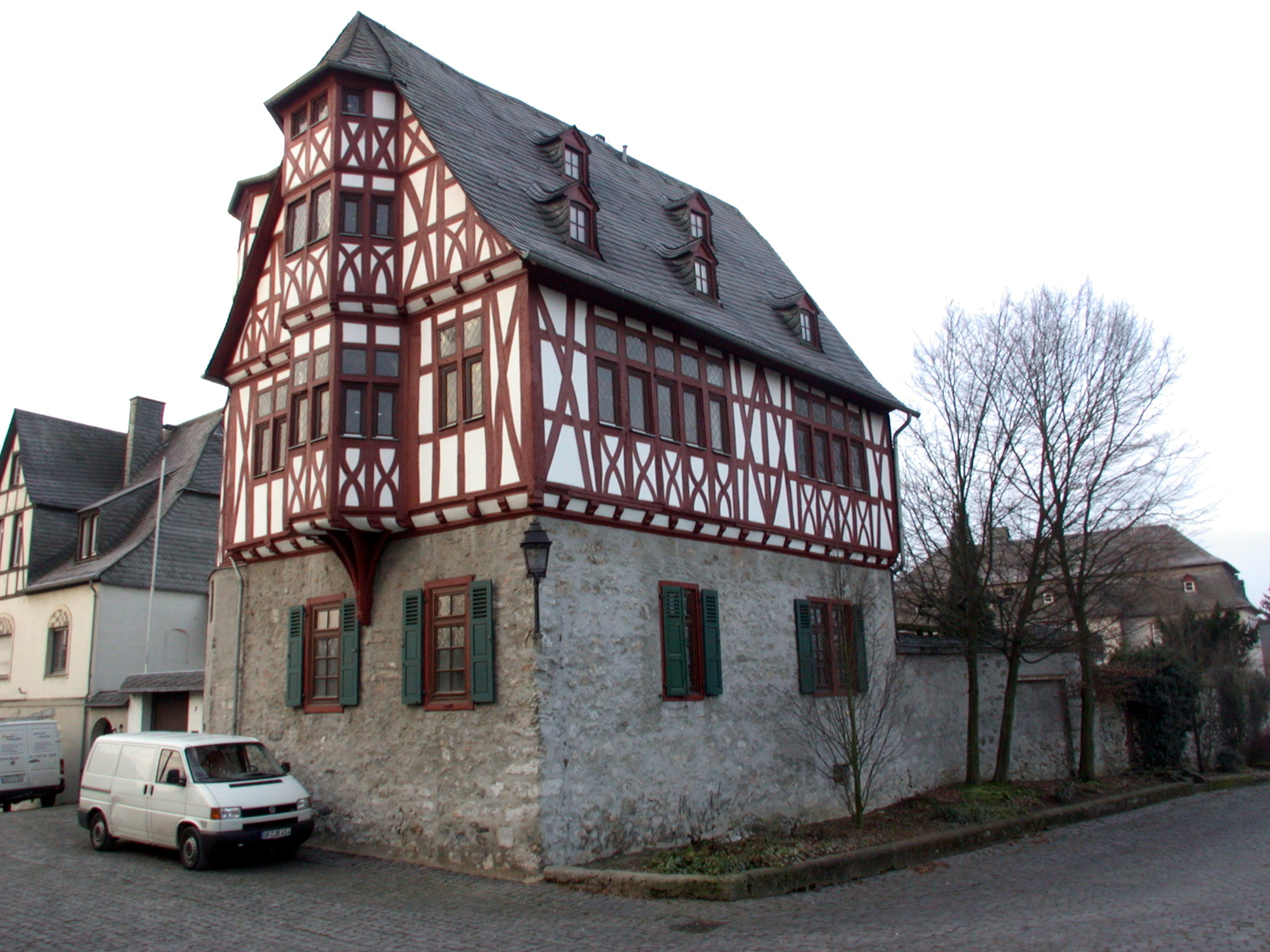 Ehemaliges Vikariat am Domplatz in Limburg an der Lahn, Deutschland